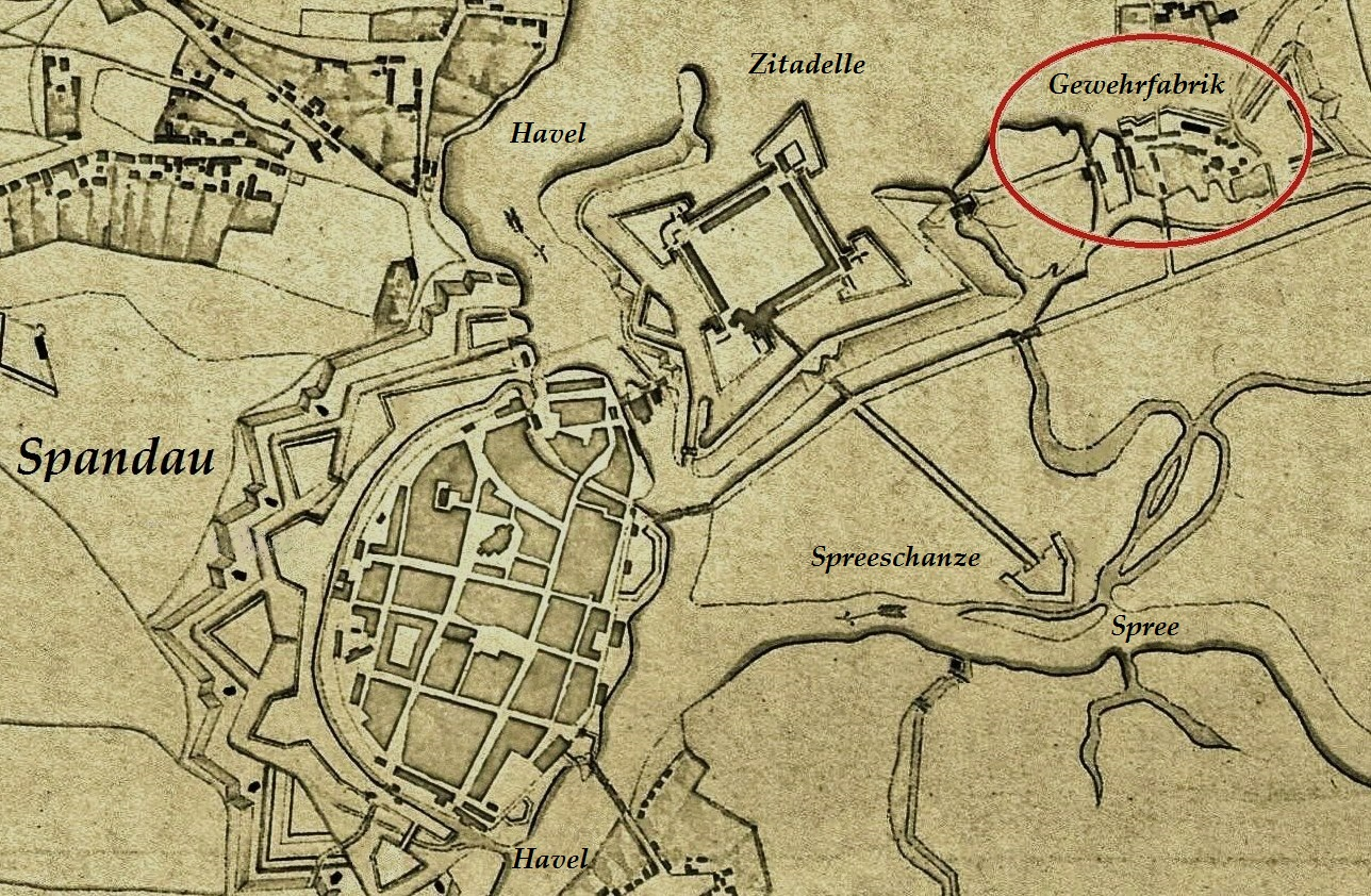 Eingenordeter Ausschnitt der Karte File:Situations Plan von der Stadt und Festung Spandow 1812.jpg